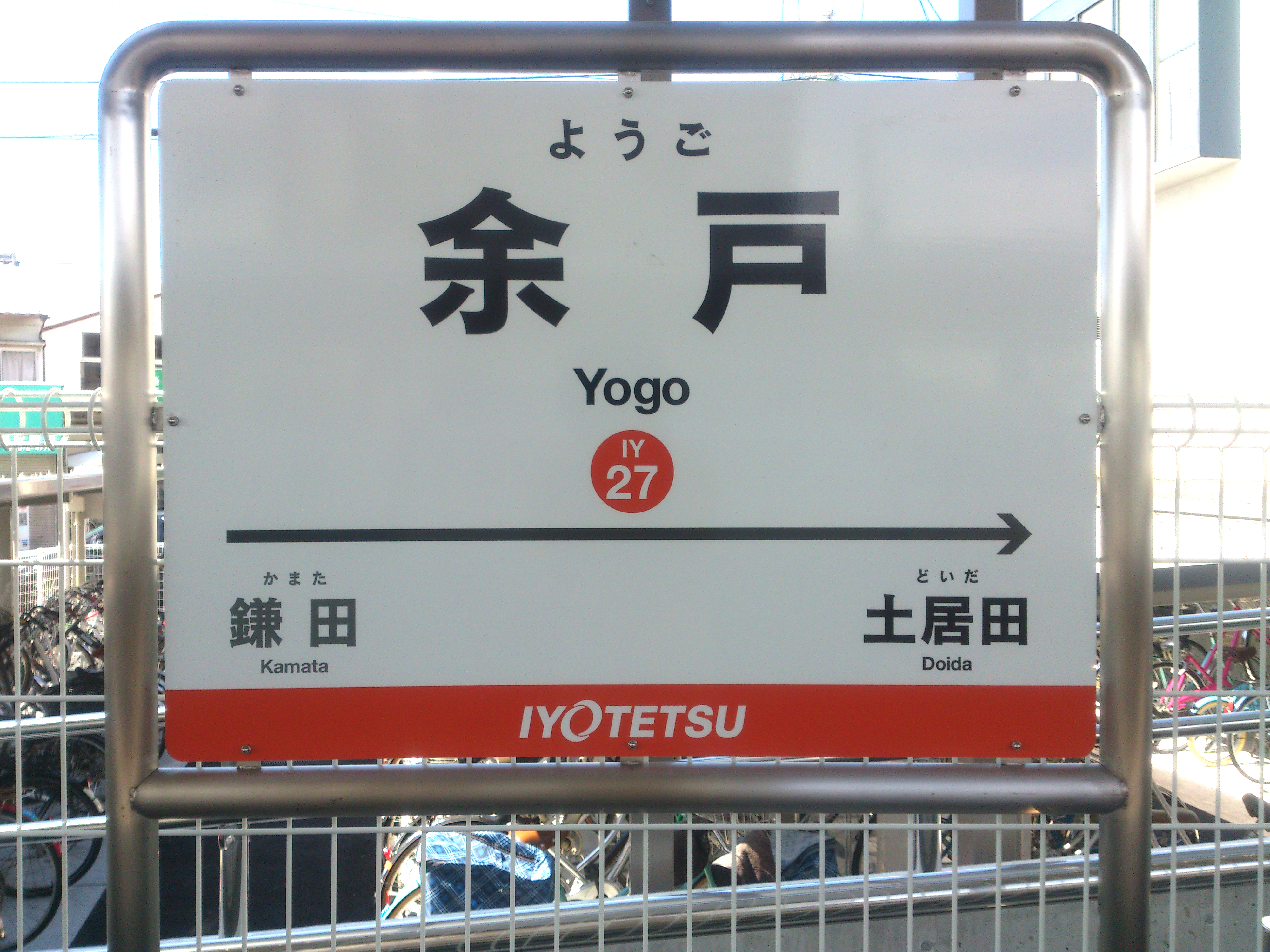 余戸駅の駅名標